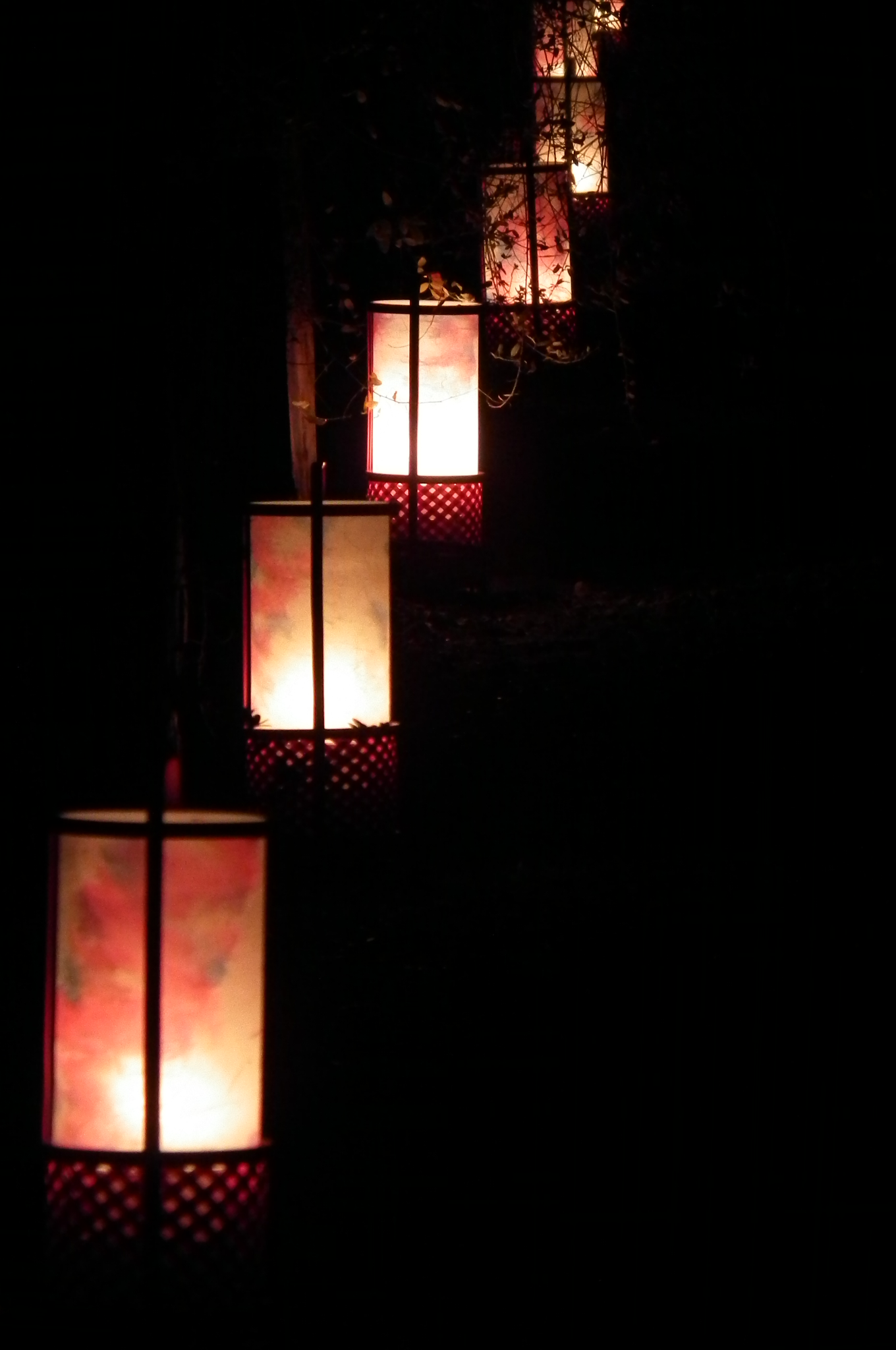 Arashiyama Hanatōro 嵐山花灯路・二尊院